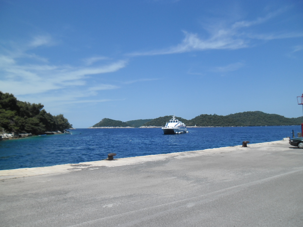 katamaran iz Dubrovnika dolazi u Uble (otok Lastovo)